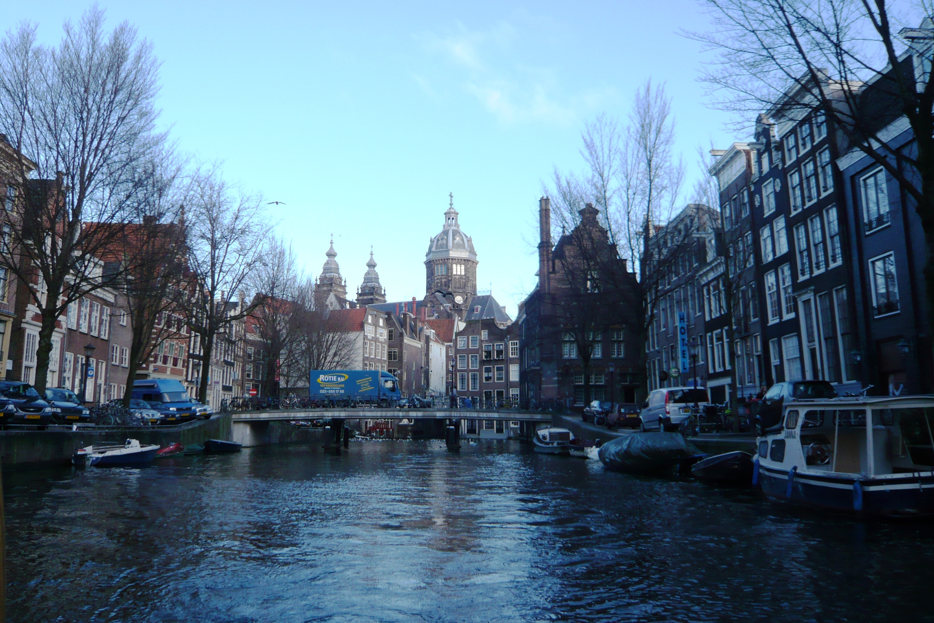 Oudezijds Voorburgwal, met erachter de Nicolaaskerk, Amsterdam. Rechts van de brug: Vredenhofje, Vredenburgersteeg 1.